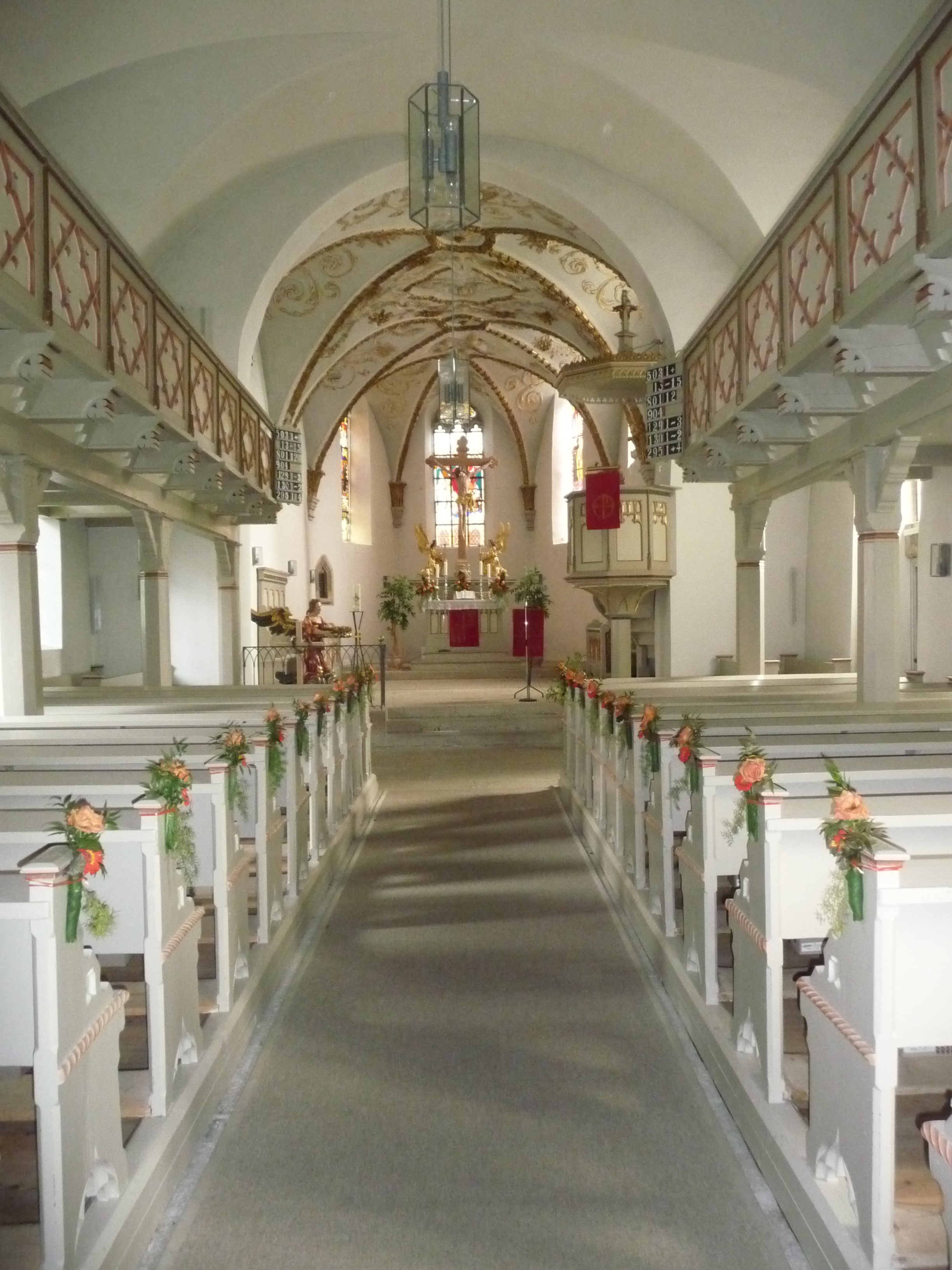 Innenansicht der Sparnecker Kirche St. Vitus